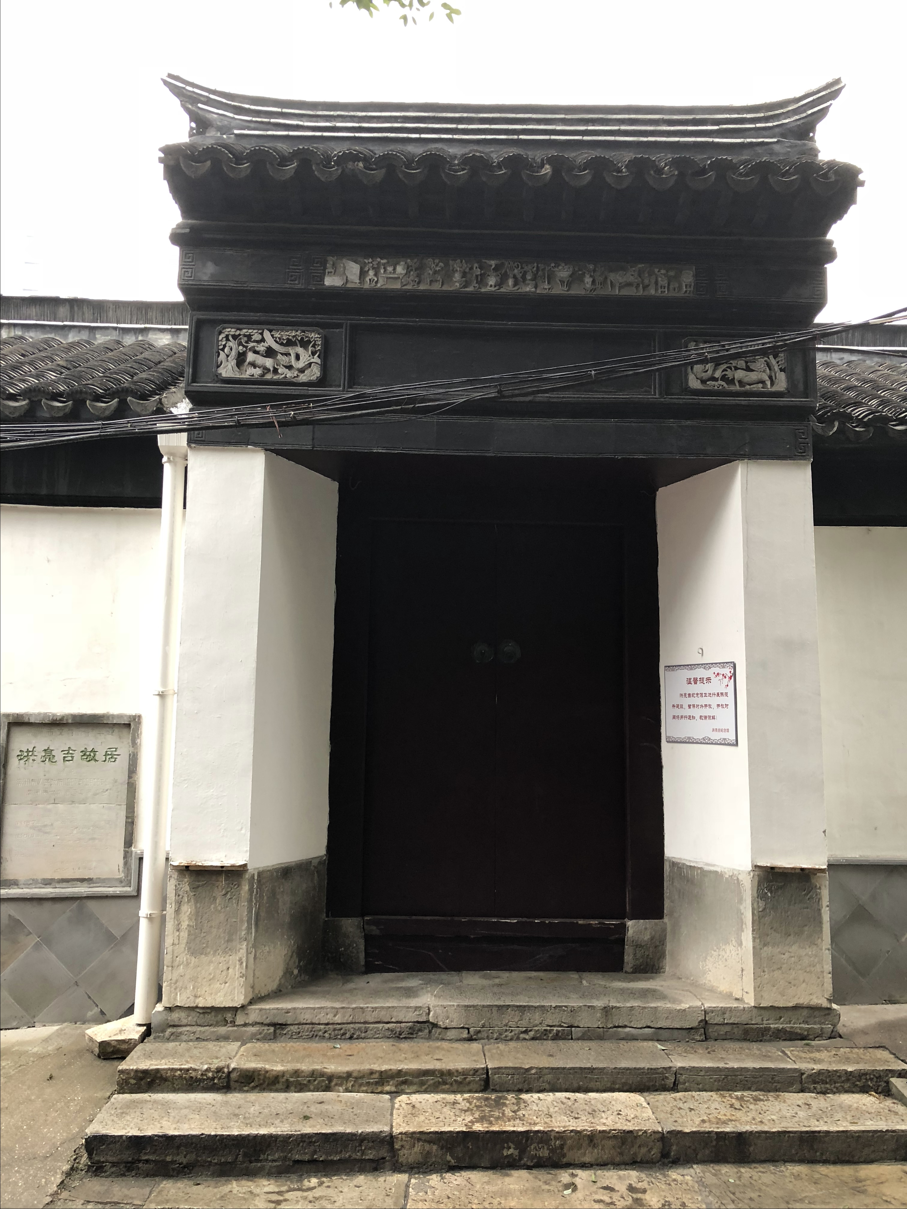 中文（中国大陆）: 洪亮吉故居 入口